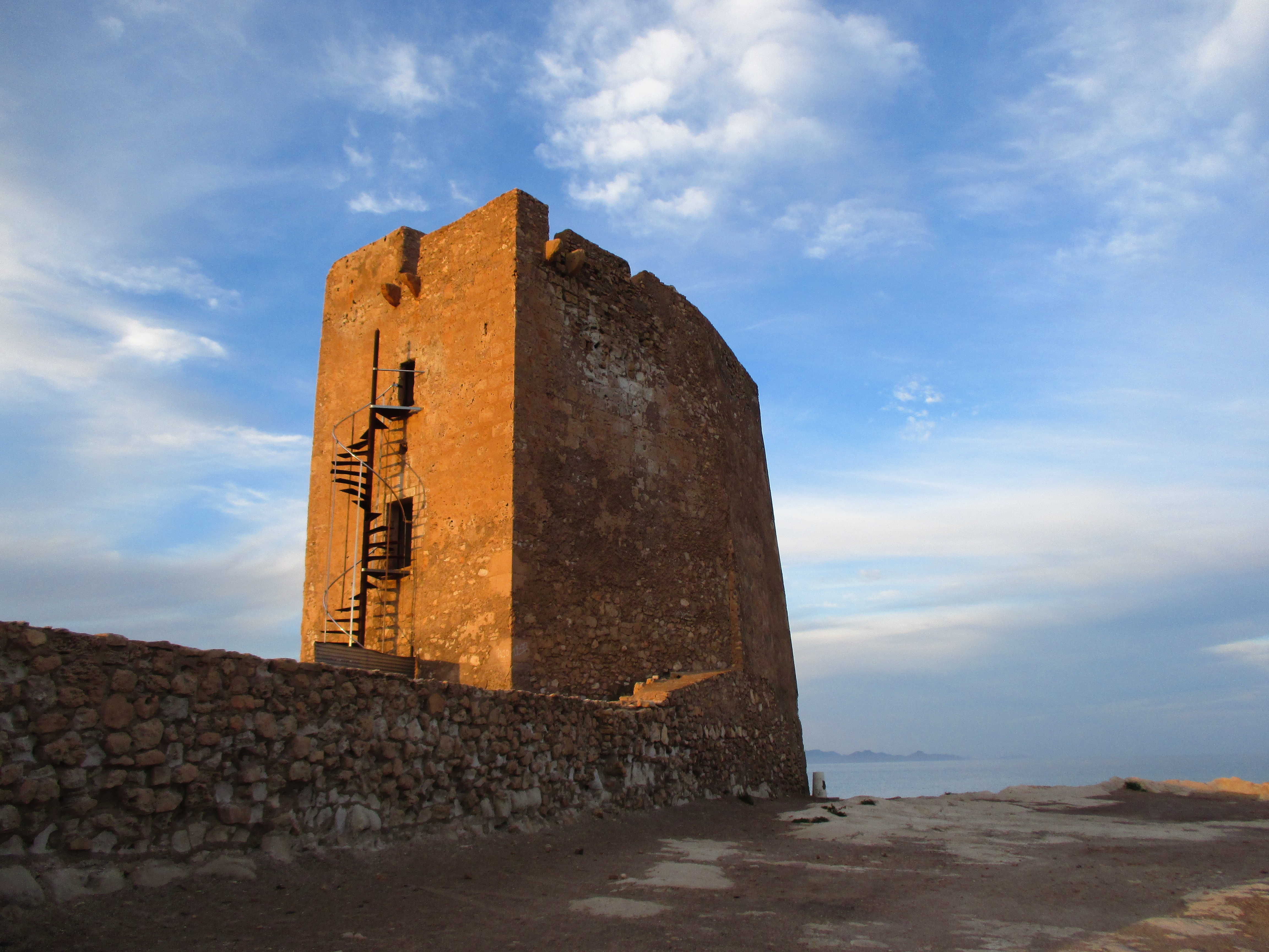 La Torre de Cope, al norte del cabo, se construyó en el siglo XVIII para proteger la zona ante los ataques de los piratas berberiscos. Al fondo, las Puntas de Calnegre. This is a photography of a Site of Community Importance in Spain with the ID: ES6200012. Natura2000 entry, EEA entry